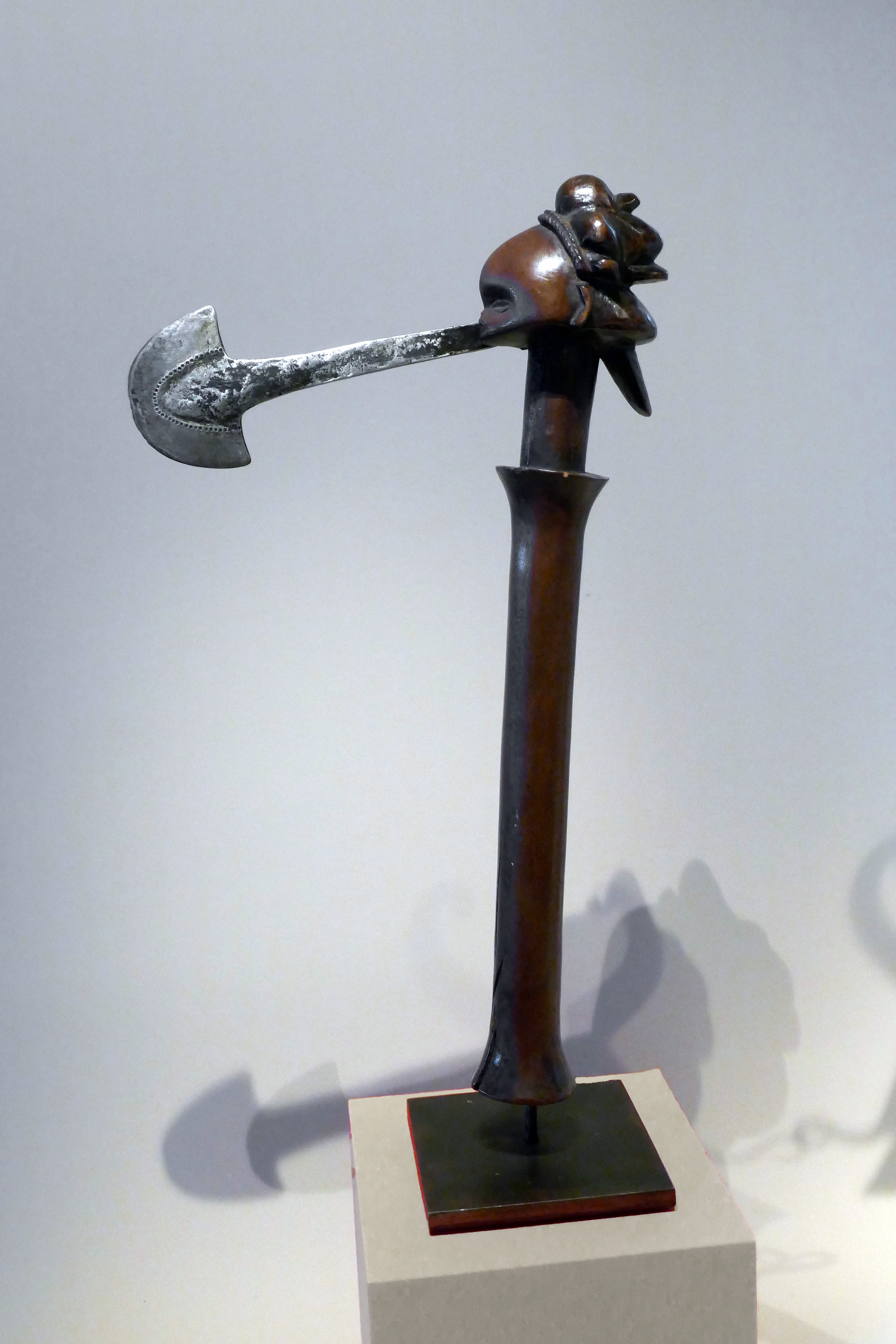 Hache Populations Kalundwe et Kanyok République démocratique du Congo (RDC) Artiste inconnu Début du 20e siècle Bois, fer Collection Felix Objet présenté lors de l'exposition Frapper le fer. L'art des forgerons africains au musée du quai Branly Jacques Chirac.